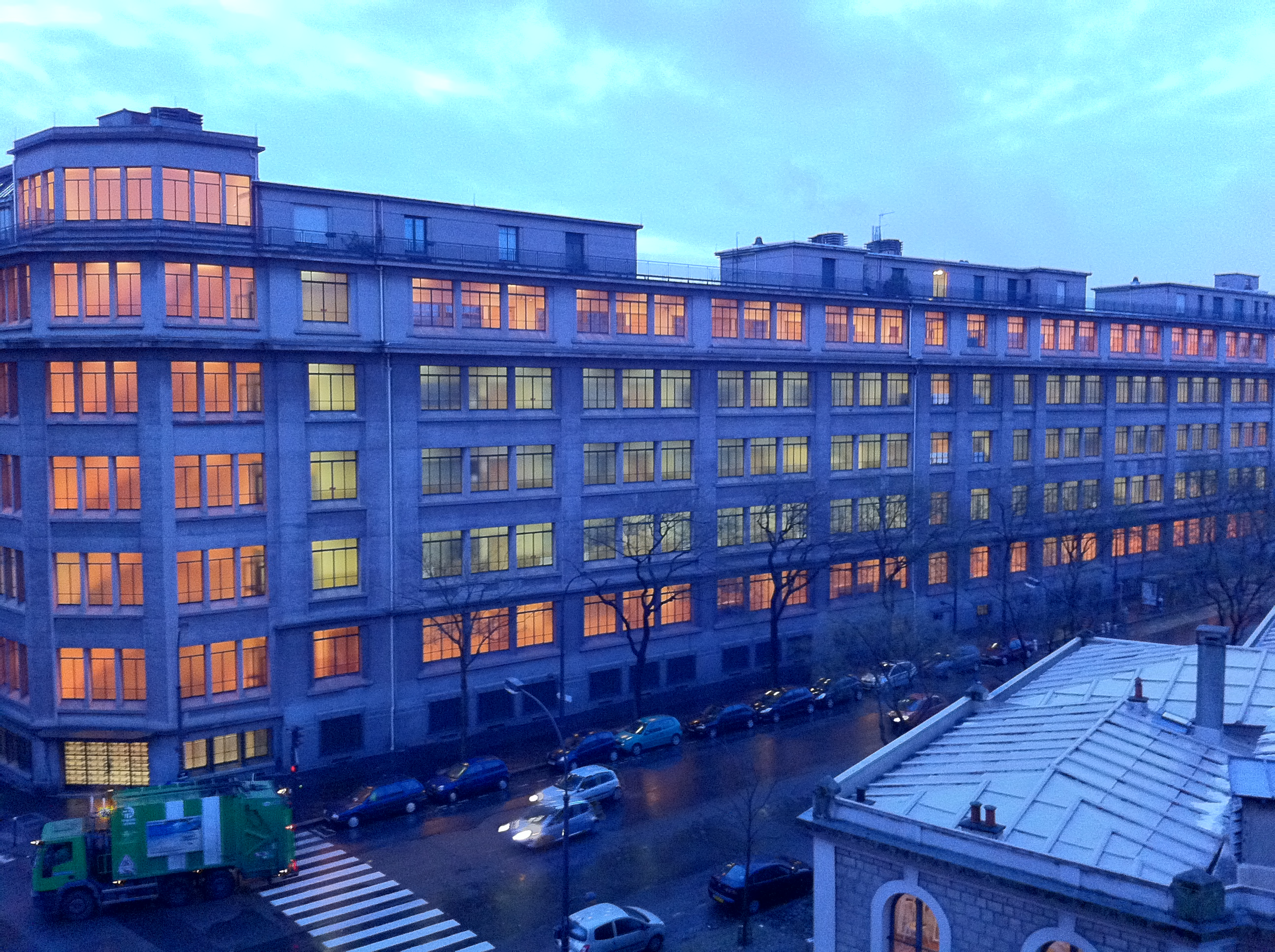 Le lycée Hélène-Boucher et Rue des Pyrénées vue de Rue de Lagny (Paris 20ème)